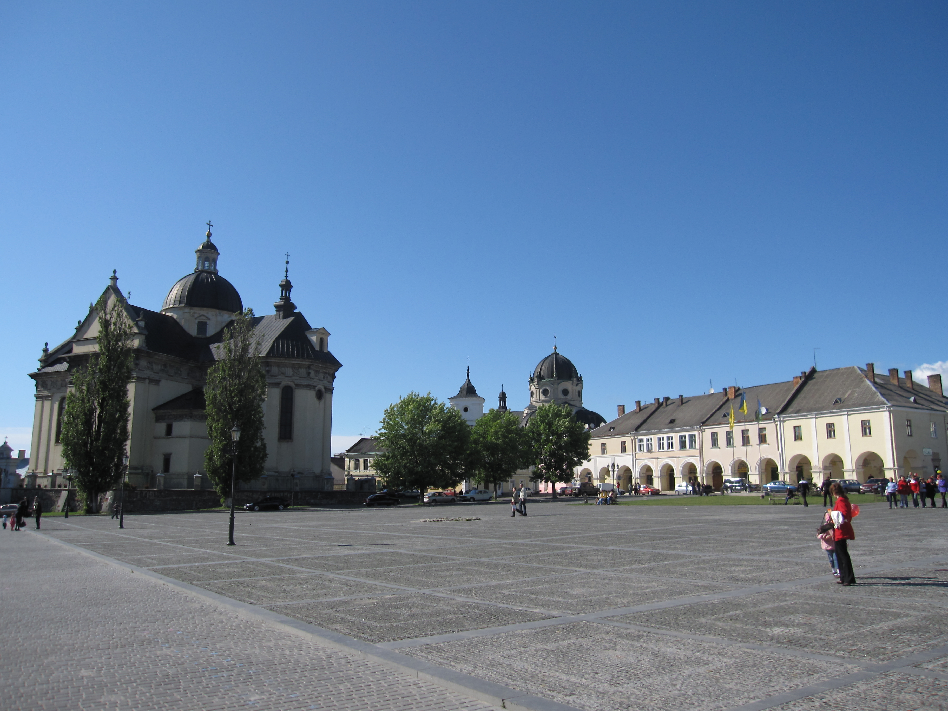 Zhovkva